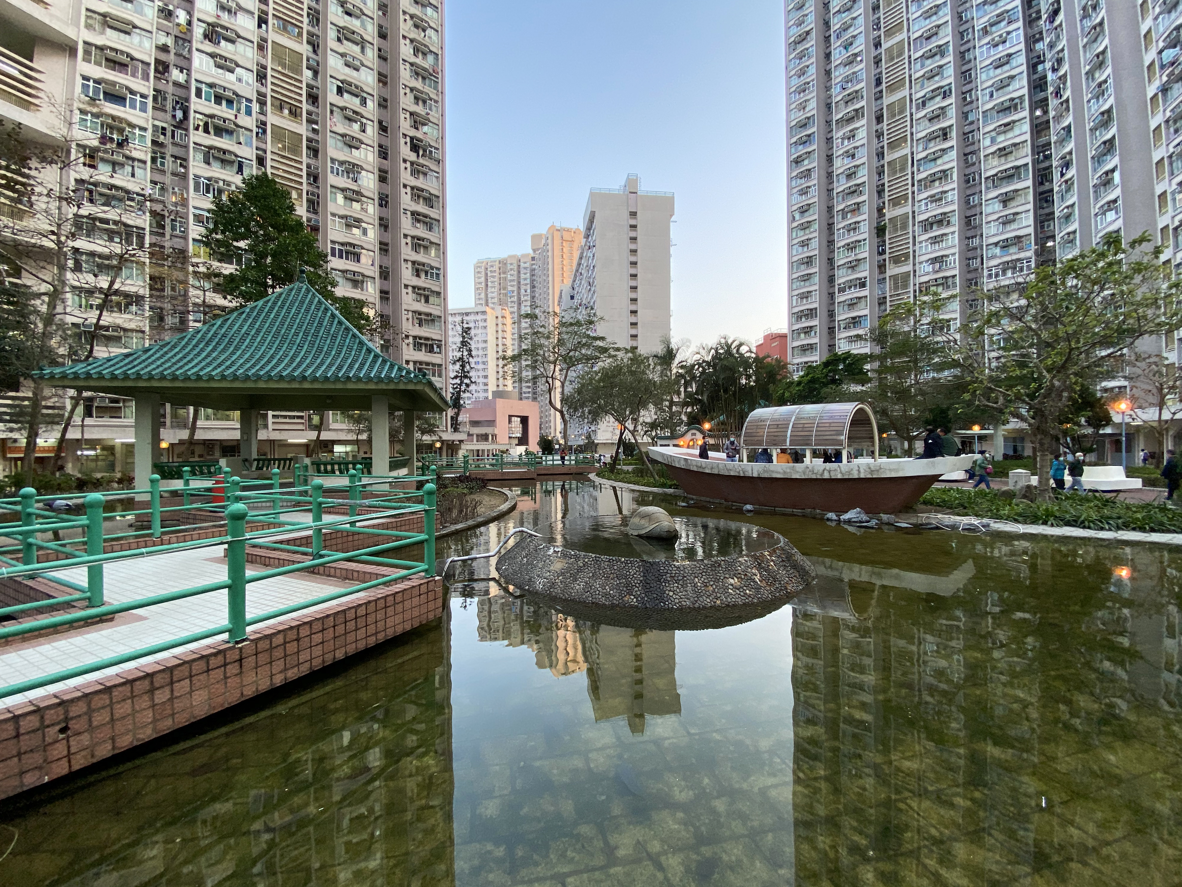 King Lam Estate Pond